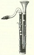 Batyphon issu du dictionnaire Larousse, 1898